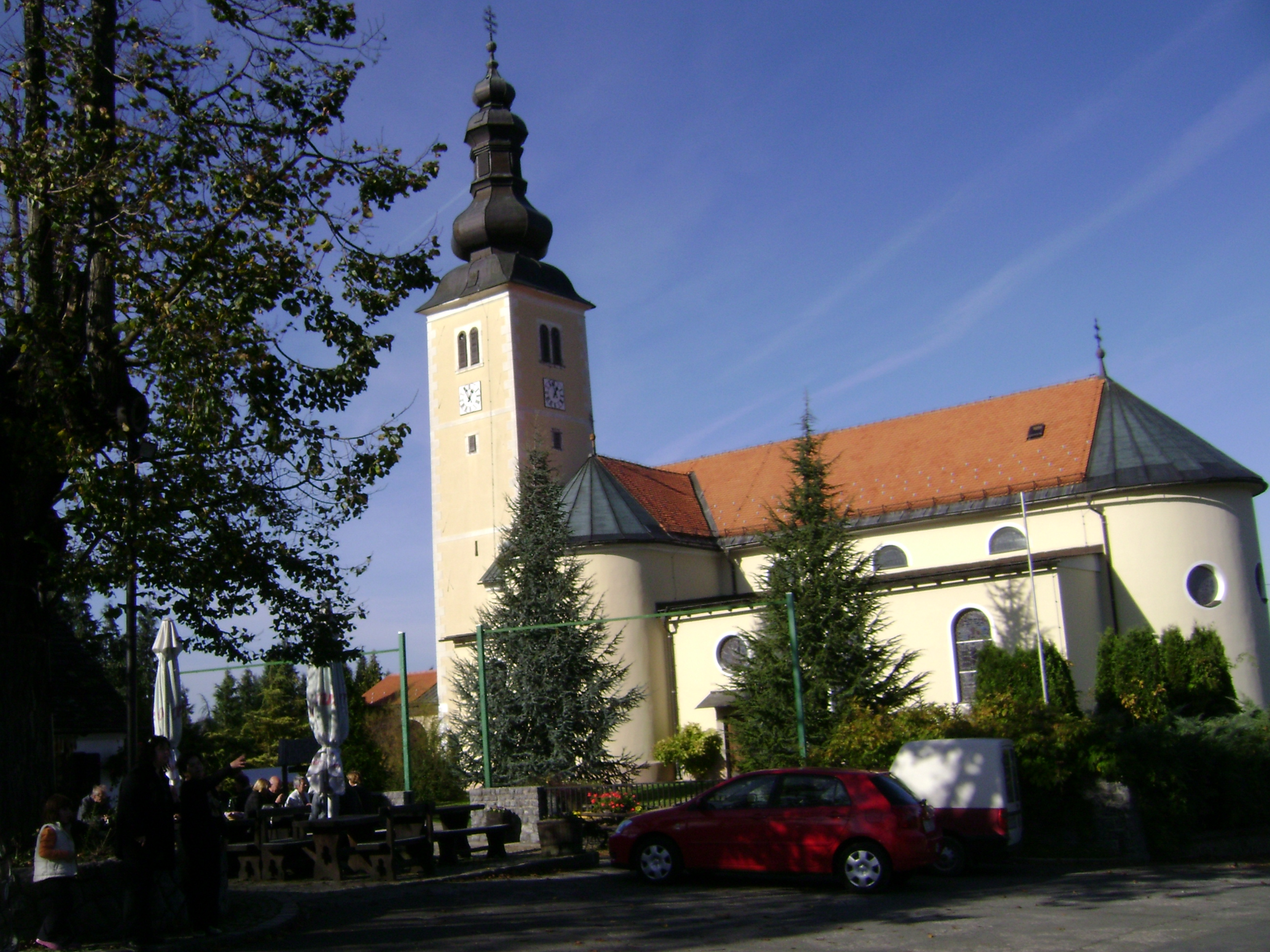 Župna crkva sv.Jurja, Gornja Stubica